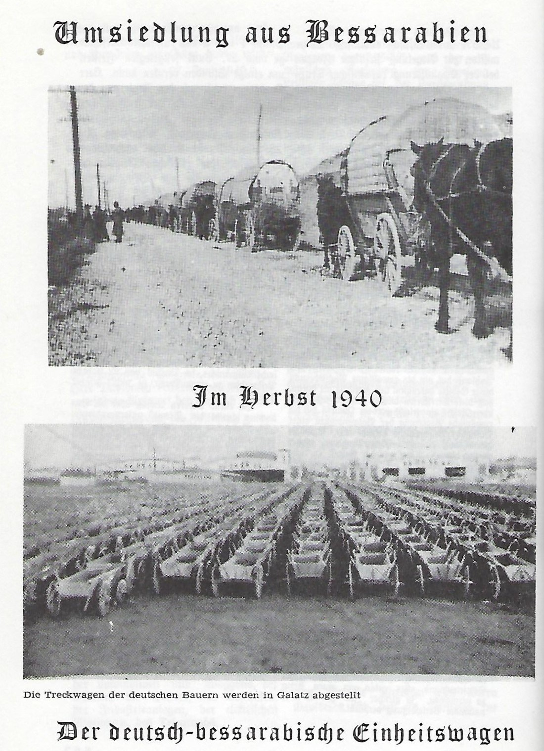 Umsiedlungstreck von Bessarabiendeutschen; abgestellte Treckwagen in Galatz